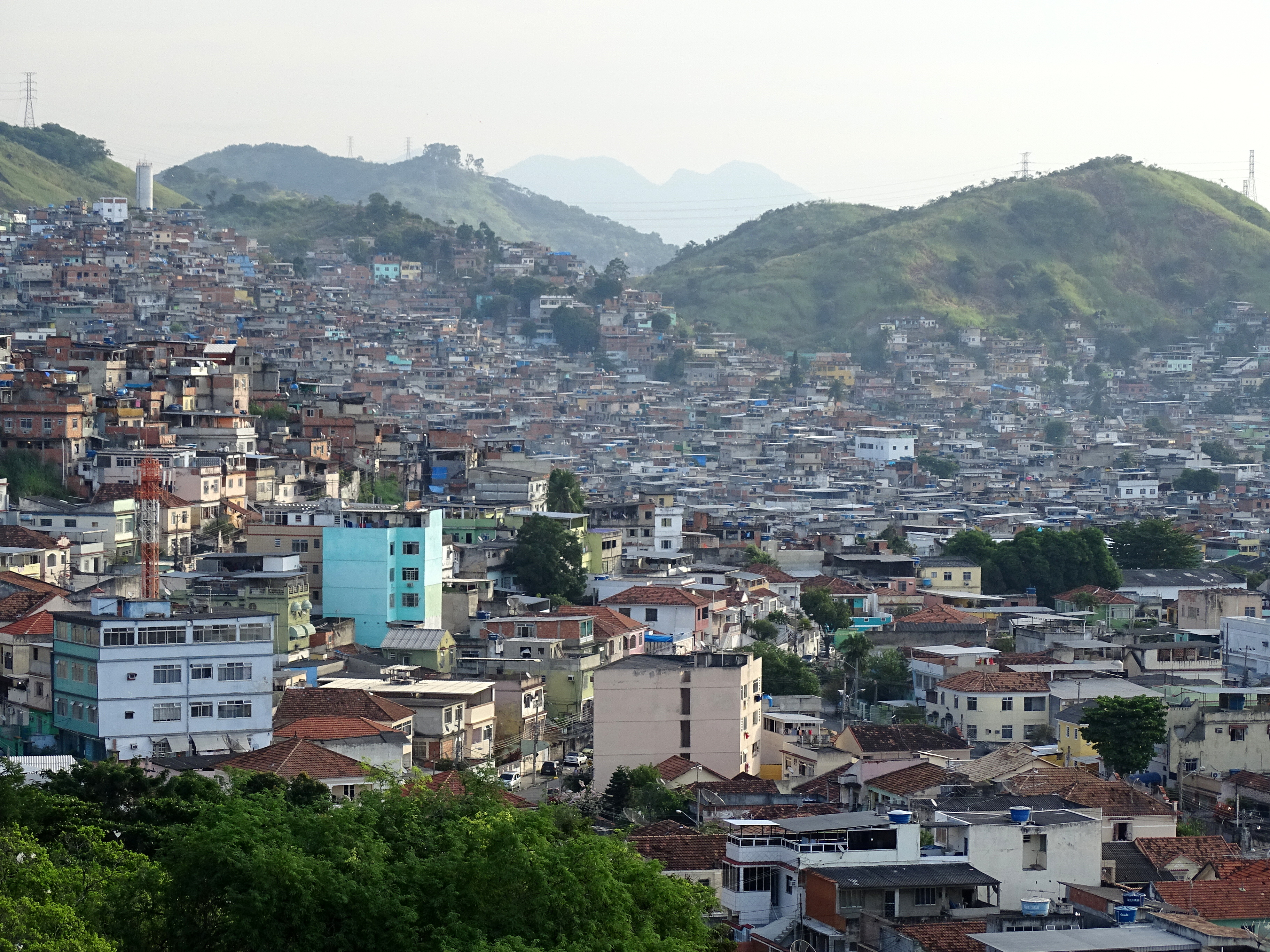 View over Complexo do Alemao (Favela) - From Igreja da Penha - Rio de Janeiro - Brazil - 01